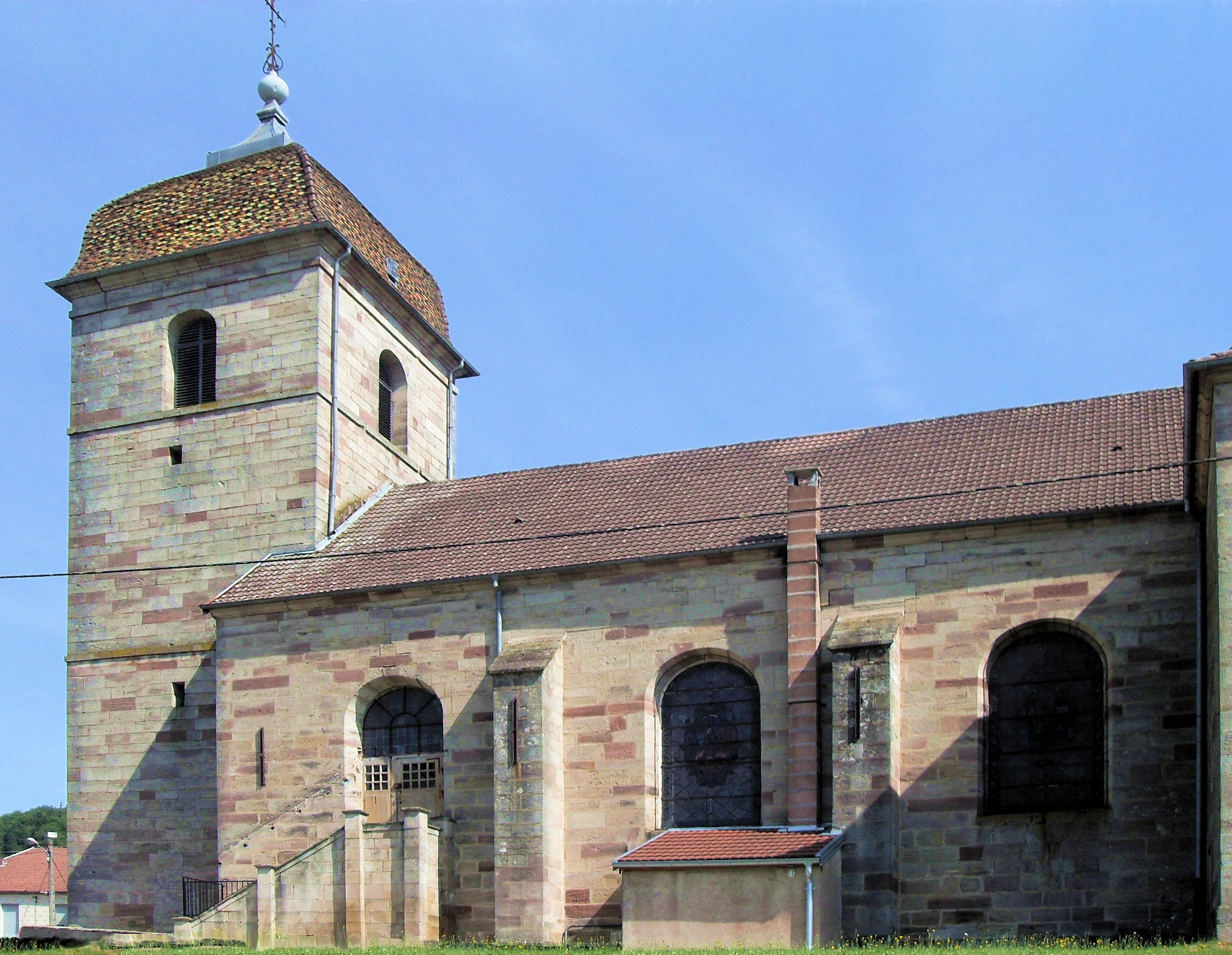 L'église Sainte-Madeleine à Sainte-Marie-en-Chanois, côté sud